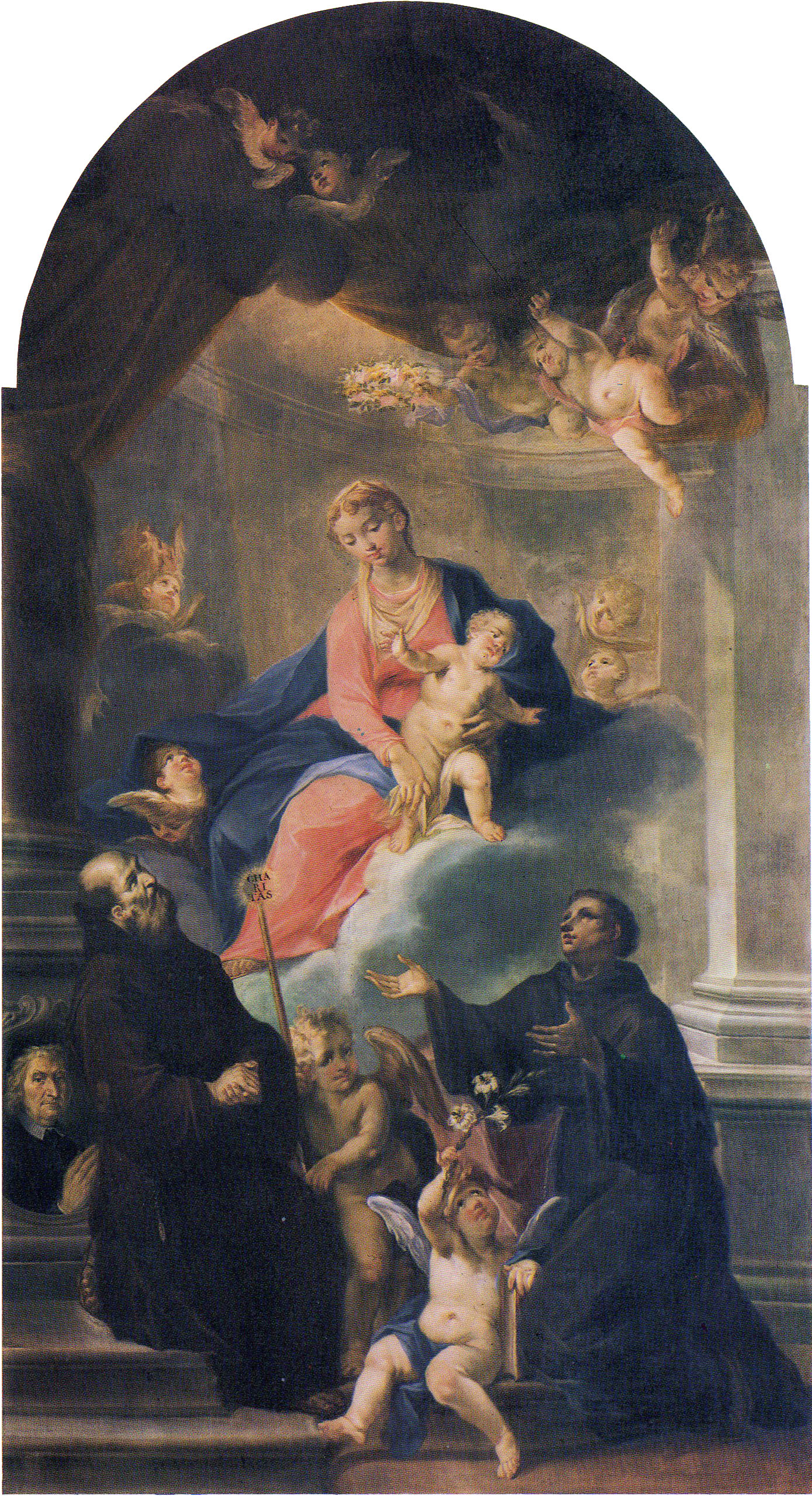 Madonna col bambino tra i santi francesco e antonio da padova (pietro avogadro, chiesa di san carlo, brescia)